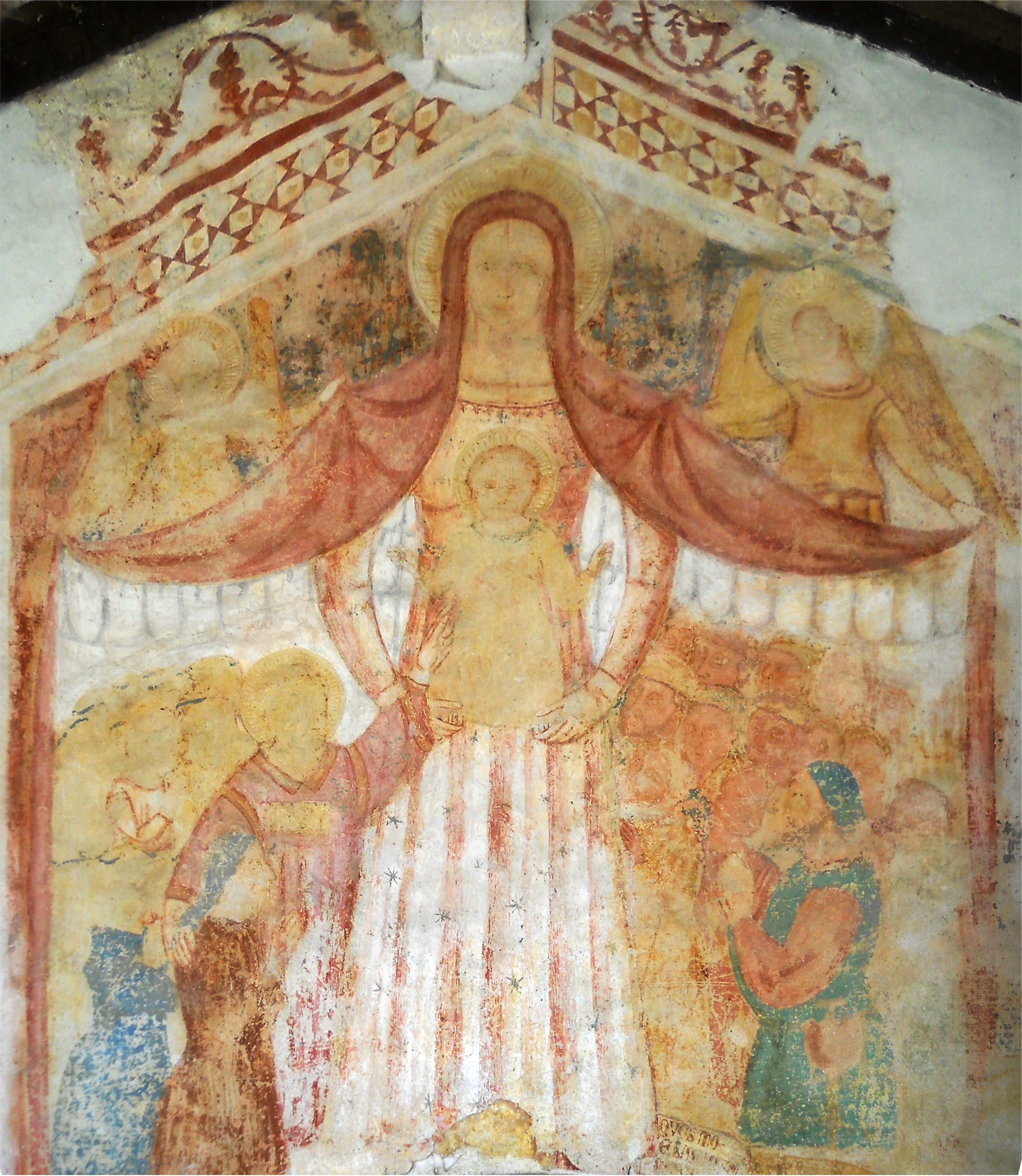 Chiesa romanica di San Leonardo sul monte Moro (XIV secolo) presso San Mauro di Saline, provincia di Verona. Affresco "Madonna con Bambino" posto all'esterno sopra l'ingresso principale.